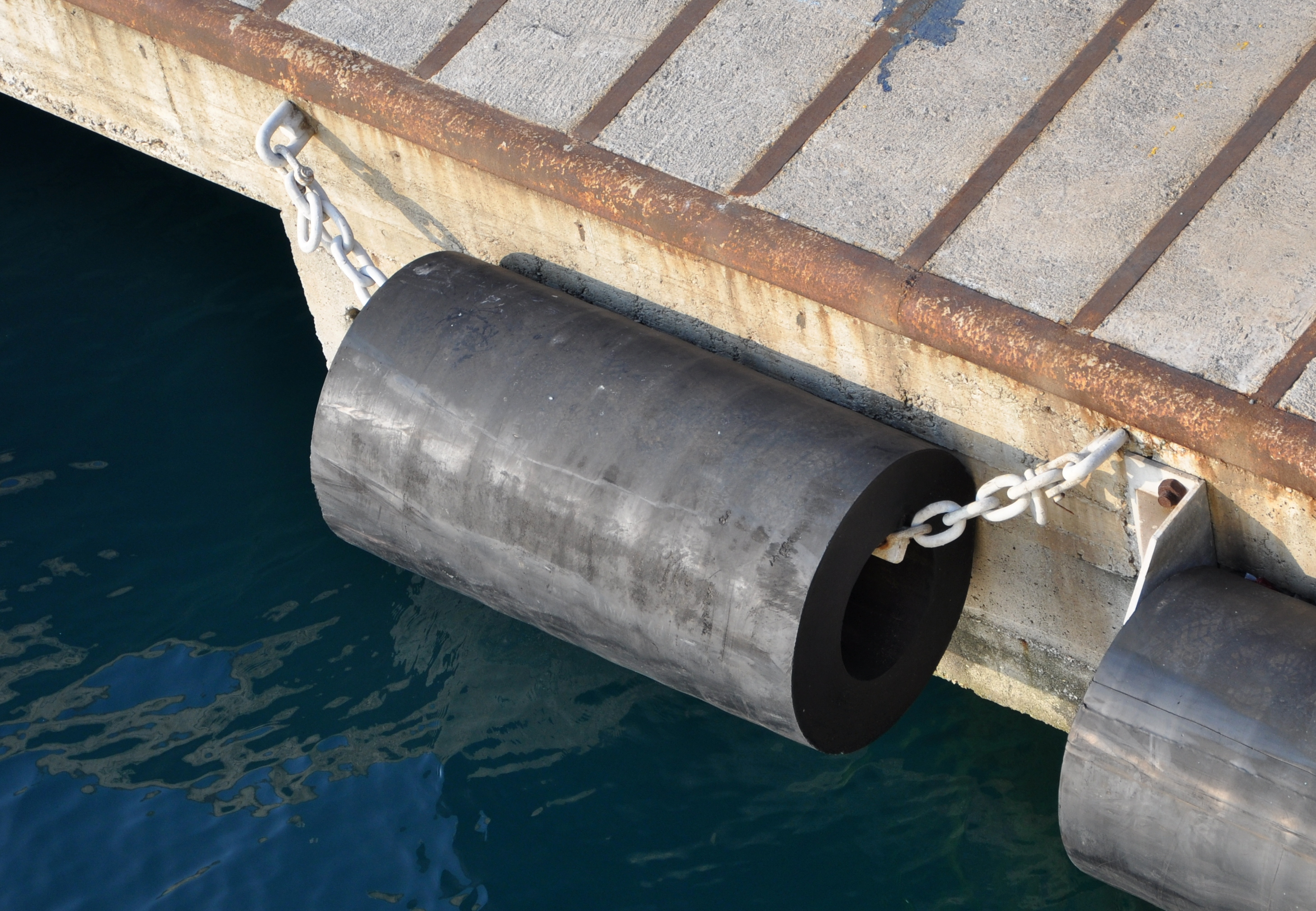 Rubber Fender in port Vado Ligure